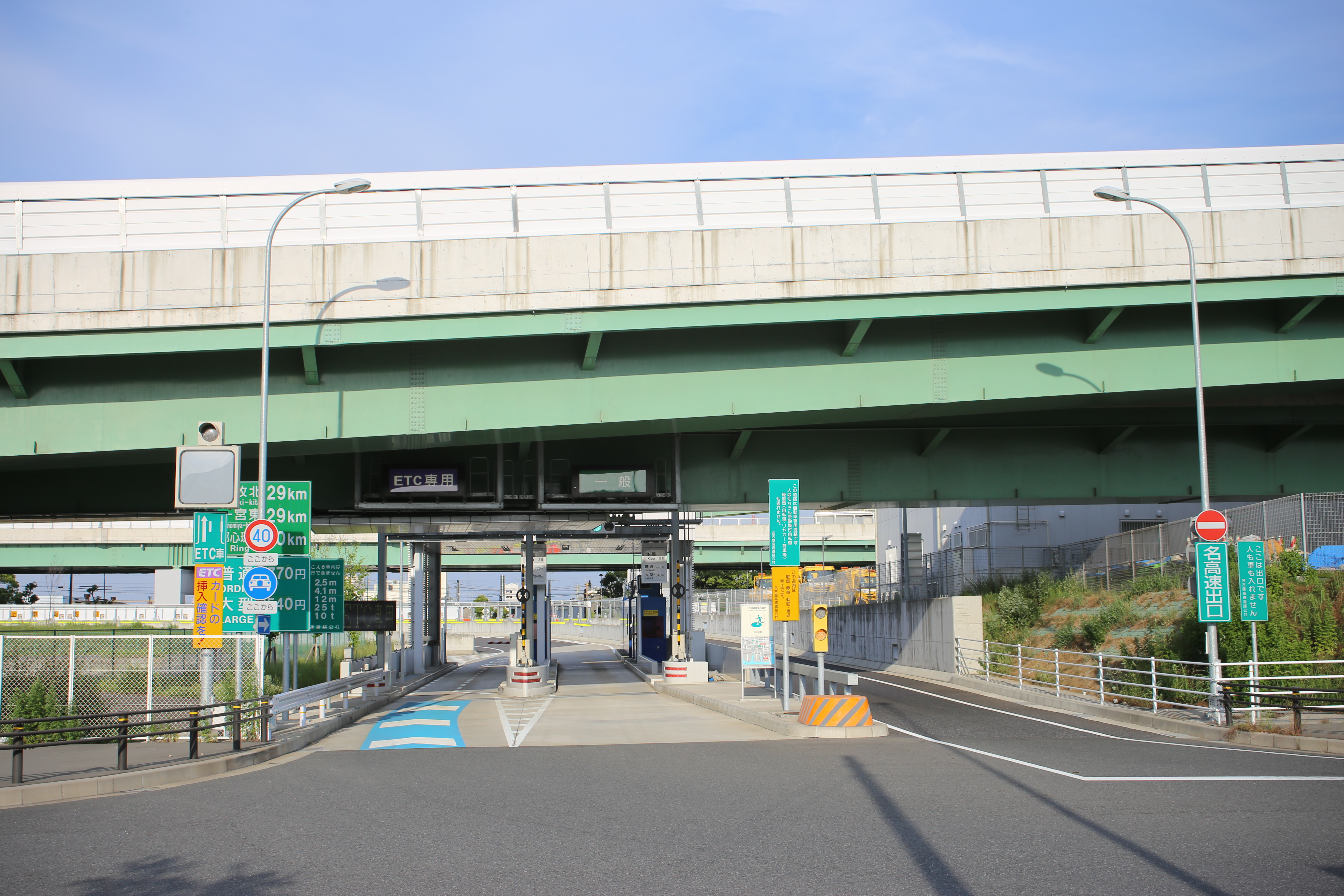 名古屋市港区船見町の名古屋高速道路4号東海線船見町出入口を西側公道より撮影